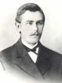 Aron Hedenberg ca 1884